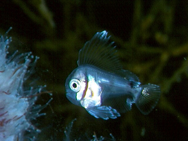 ヤエギス Caristius macropus